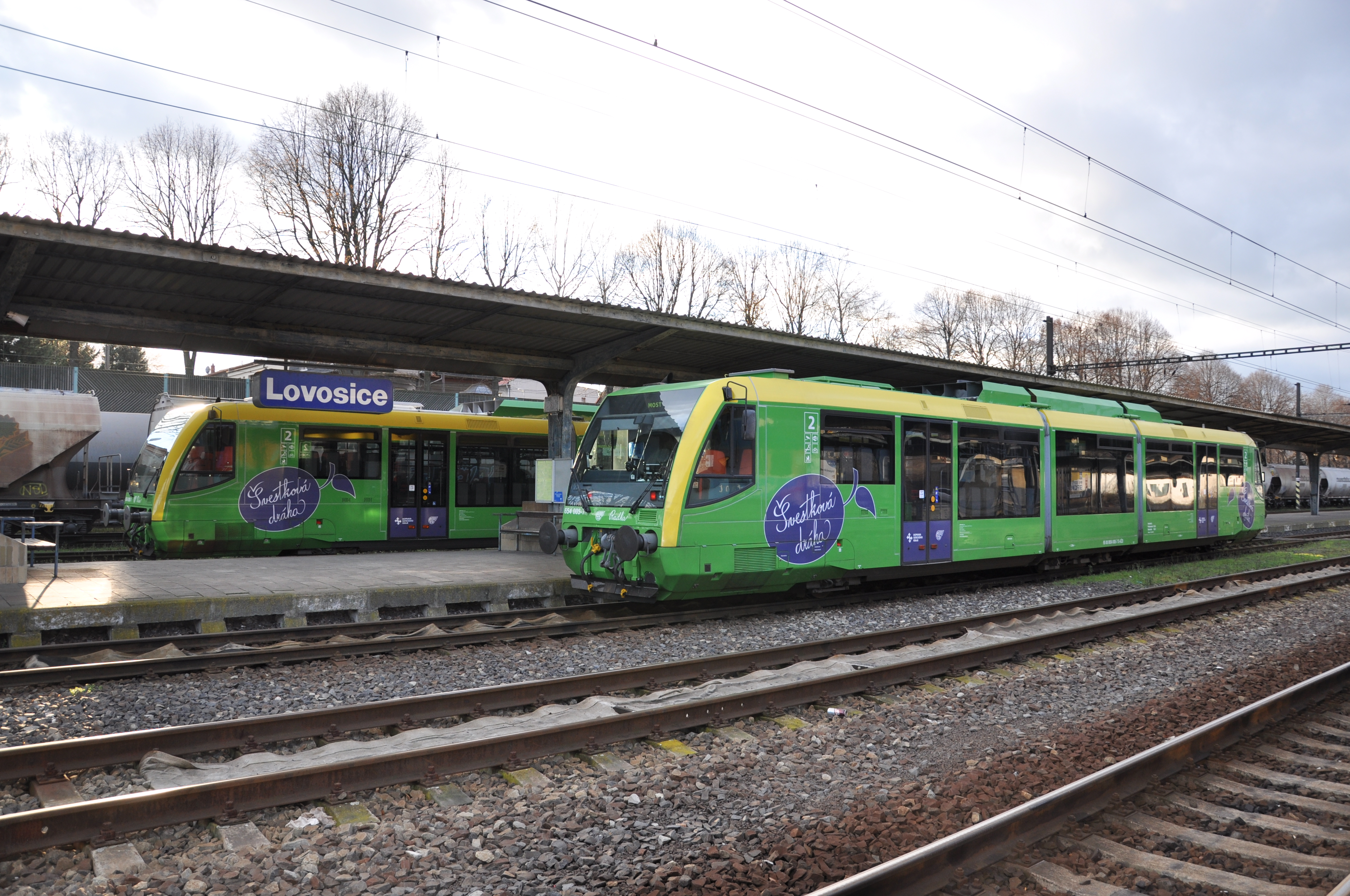 Regiosprinter des tschechischen Eisenbahnverkehrsunternehmens AŽD Praha im Bahnhof Lovosice, Tschechien. Die Fahrzeuge stammen von der Rurtalbahn in Deutschland und kommen seit 15. Dezember 2019 auf der Linie U10 Litoměřice – Lovosice – Most planmäßig zum Einsatz.